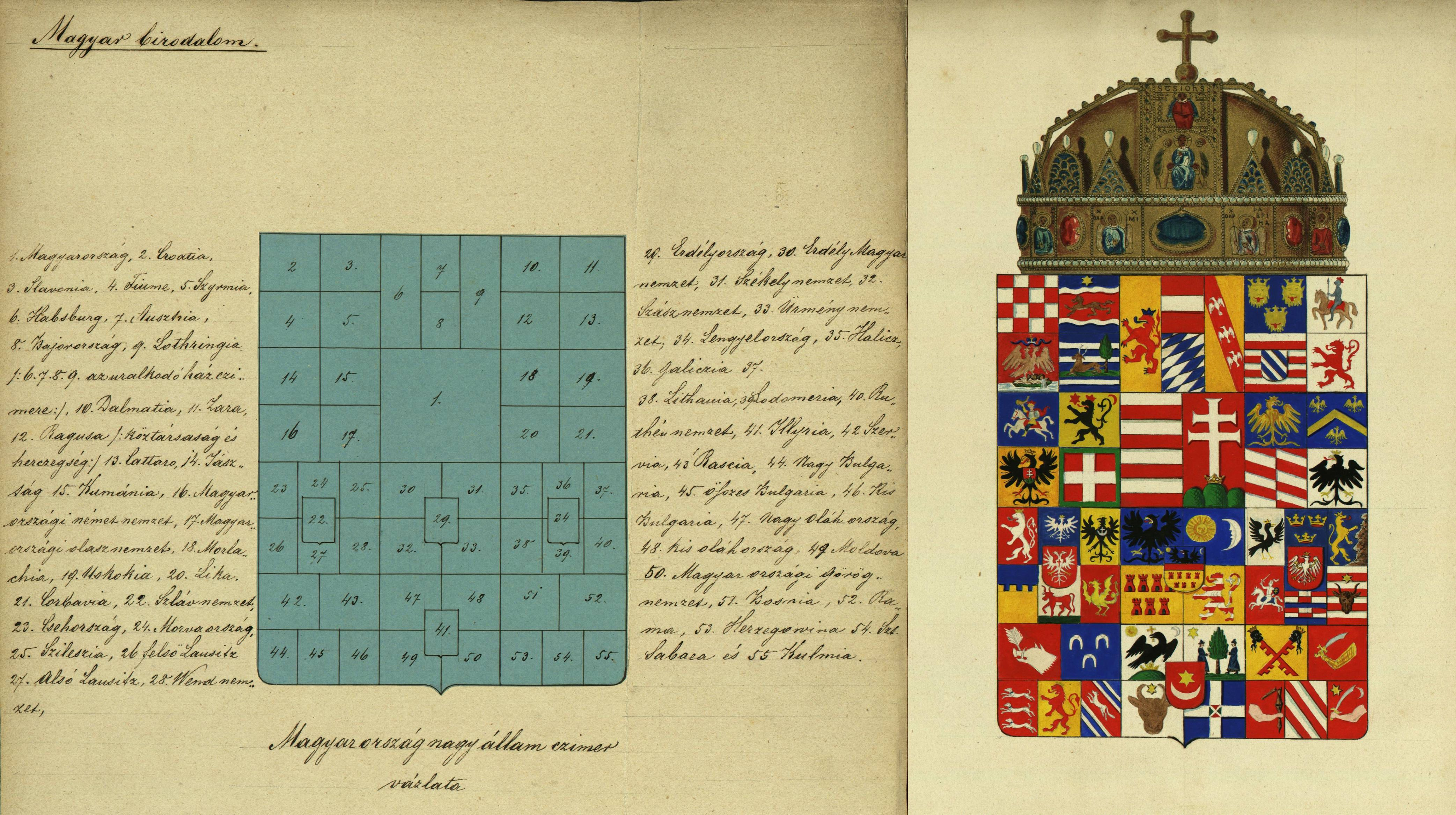 Magyarország nagycímerének terve Altenburger Gusztávtól